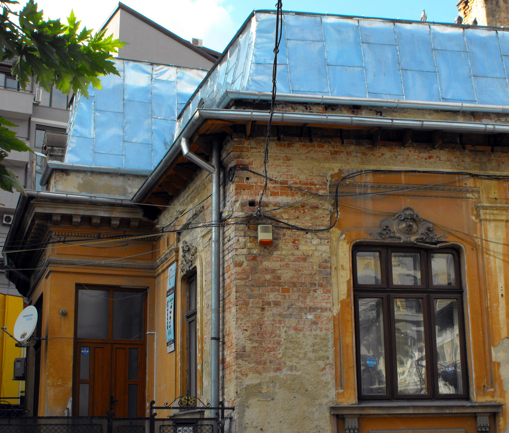 Icoanei 63